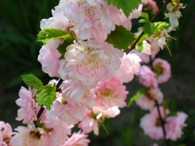 Migdałowiec trójklapowy (Amygdalus triloba (Lindley) Spach) z mojego ogrodu